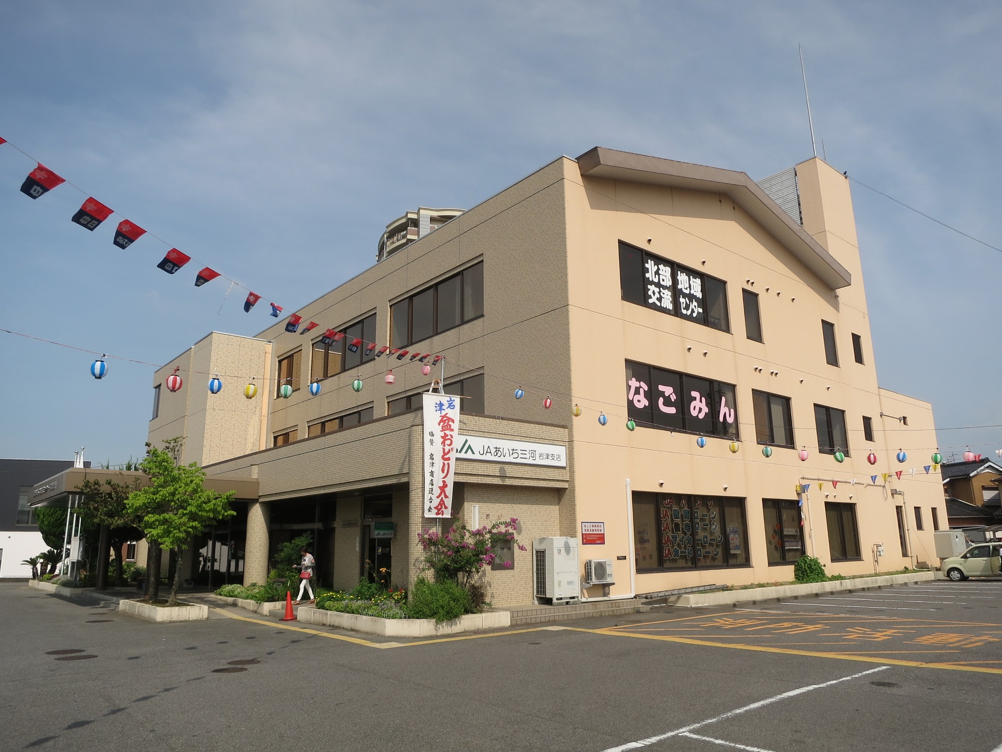 岡崎市北部地域交流センター・なごみん